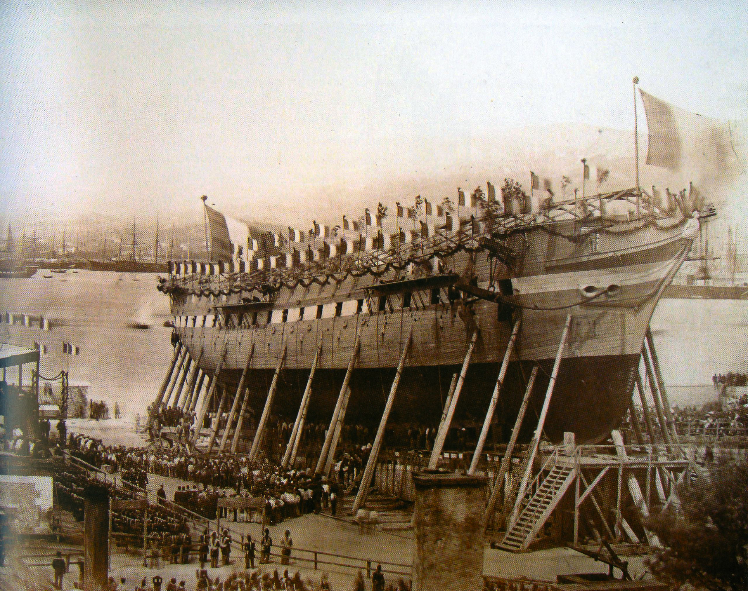 Lancement de la frégate Thémis à Toulon en 1862